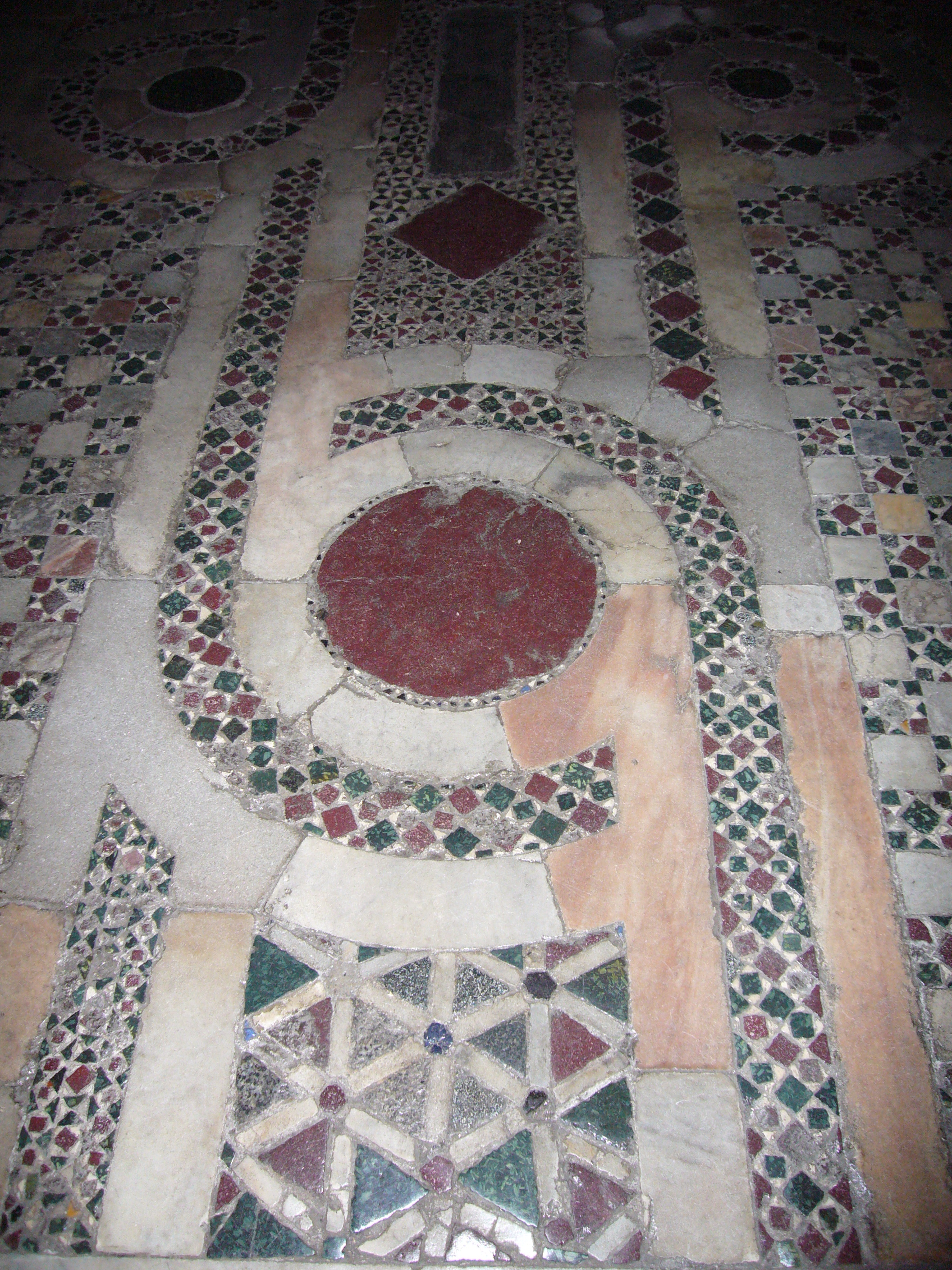 Roma, Aracoeli: pavimentazione cosmatesca